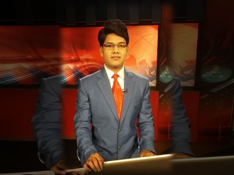 हिमांशु यादव जो कि भैंसरोली के रहने वाले हैं। देश के पहले विकलांग पत्रकार हैं। जिन्हे भारत सरकार की तरफ से भी सम्मानित किया जा चुका है।हिमांशु का नाम देश के प्रतिष्ठित पत्रकारों में शामिल किया जाता है। फिलहाल हिमांशु बीबीसी हिंदी/अंग्रेजी के साथ काम कर रहे हैं। हिमांशु ने देश के तमाम राष्ट्रीय समाचार पत्रों और समाचार टीवी चैनलों में काम किया है। ऑल इंडिया रेडियो दिल्ली और दूरदर्शन से पत्रकारिता का आगाज करने वाले हिमांशु ने जी न्यूज, इंडिया न्यूज, इंडिया वॉयस, सुदर्शन न्यूज, श्री न्यूज, जनता टीवी, टीवी100, सहारा समय जैसे समाचार चैनलों के साथ काम किया है। पत्रकारिता के साथ ही विकलांगों के अधिकारों के लिए भी हिमांशु काम कर रहे हैं।